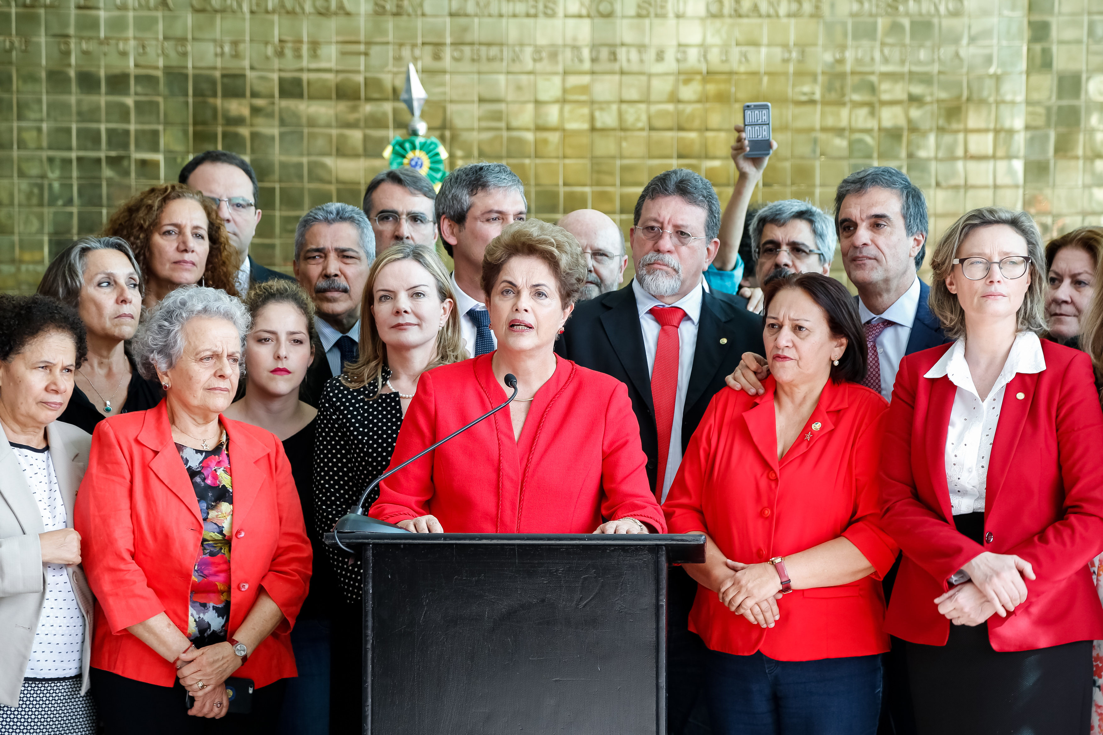 Presidenta Dilma Rousseff durante declaração a imprensa após comunicado do Senado Federal sobre o Processo de impeachment. (Brasília - DF, 31/08/2016) Foto: Roberto Stuckert Filho/PR